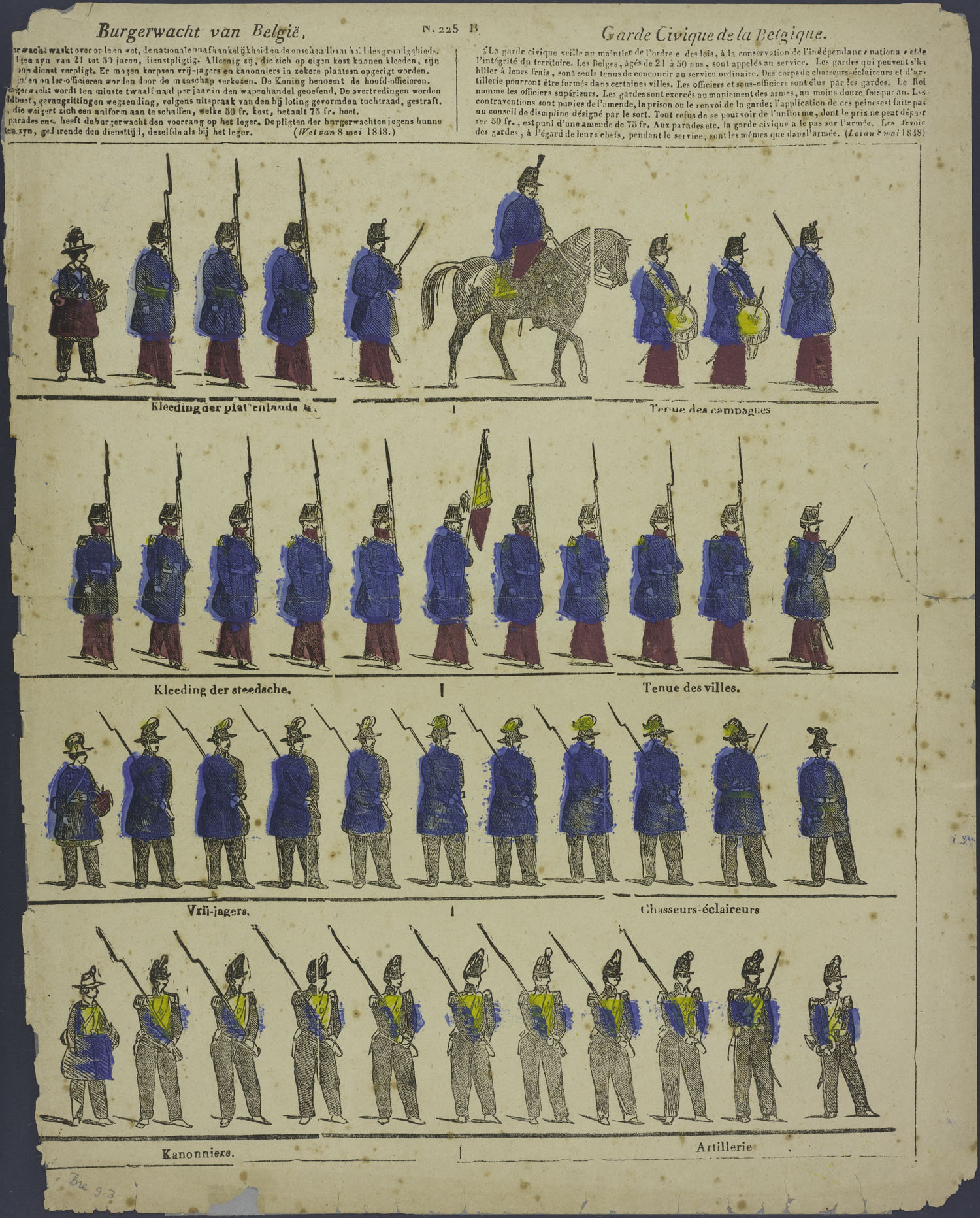 Centsprent met 4 rijen niet omkaderde houtsneden, met afbeeldingen van soldaten. Op de bovenste rij 8 soldaten te voet en 1 ruiter. Op de rijen daaronder telkens 11 soldaten te voet. Drie soldaten (?) dragen manden: markestensters of sappeurs? Onderschriften bij de vier rijen: Kleeding der plattelandsche, Kleeding der steedsche, Vrij-jagers, Kanonniers (in Nederlands en Frans). Bovenaan de prent een negenregelige tekst over de burgerwacht uit de Wet van 8 mei 1848 in Nederlands en Frans.